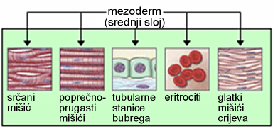 Mezoderm